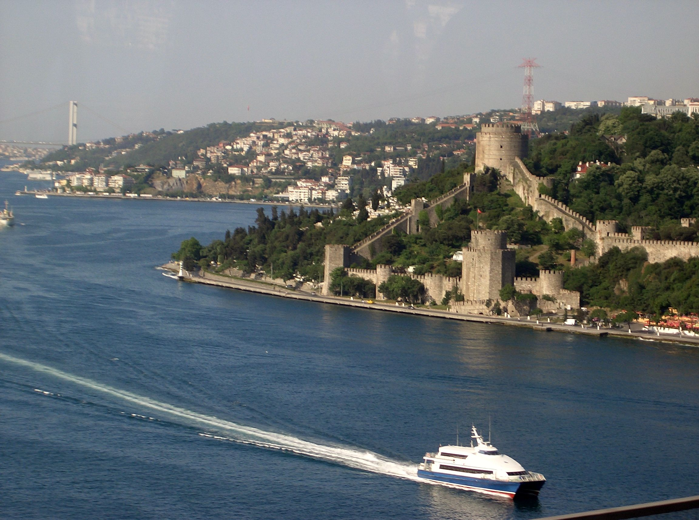 Kategori:İstanbul resimleri